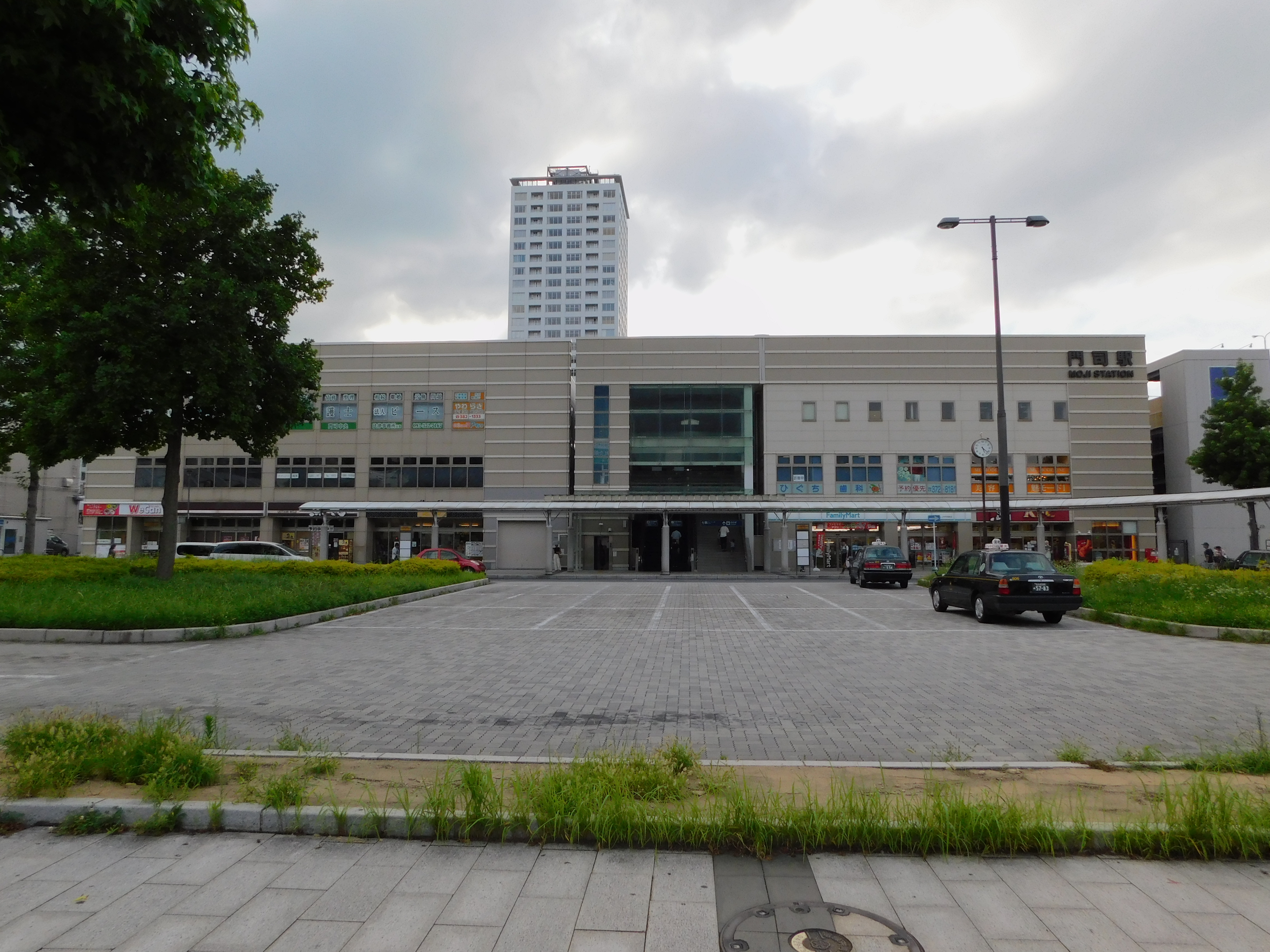 2019年7月27日撮影